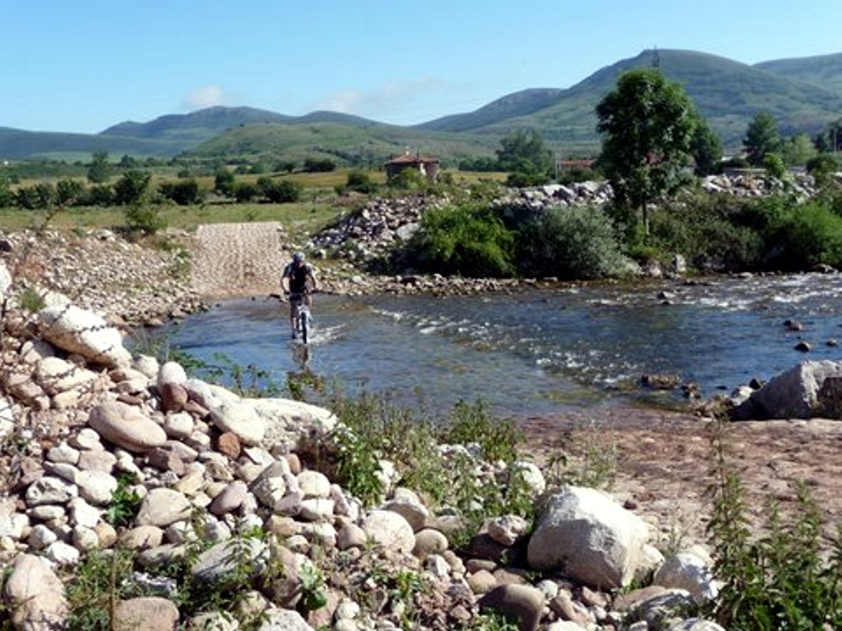 Río Híjar en Paracuelles. Michael González Harbour.